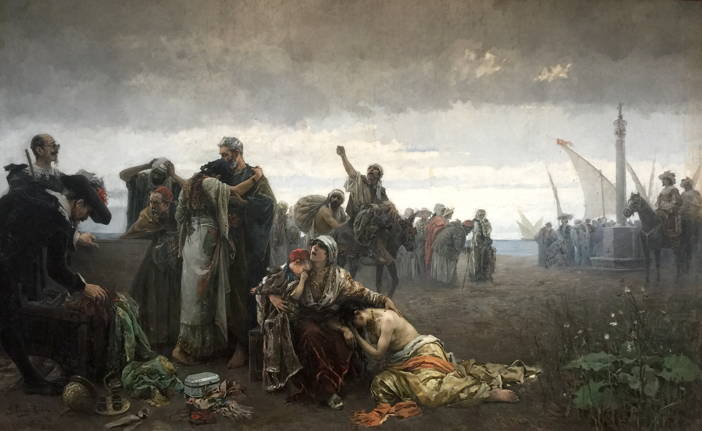 Musée des beaux-arts de Castellón